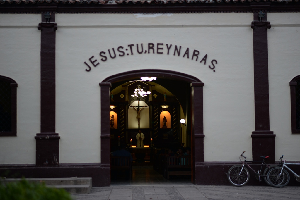 La Iglesia de Paroquia Sebastian, Achuapa, Nicaragua